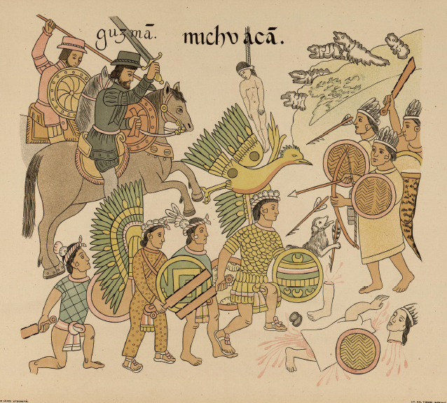 Fragmento del lienzo de Tlaxcala.